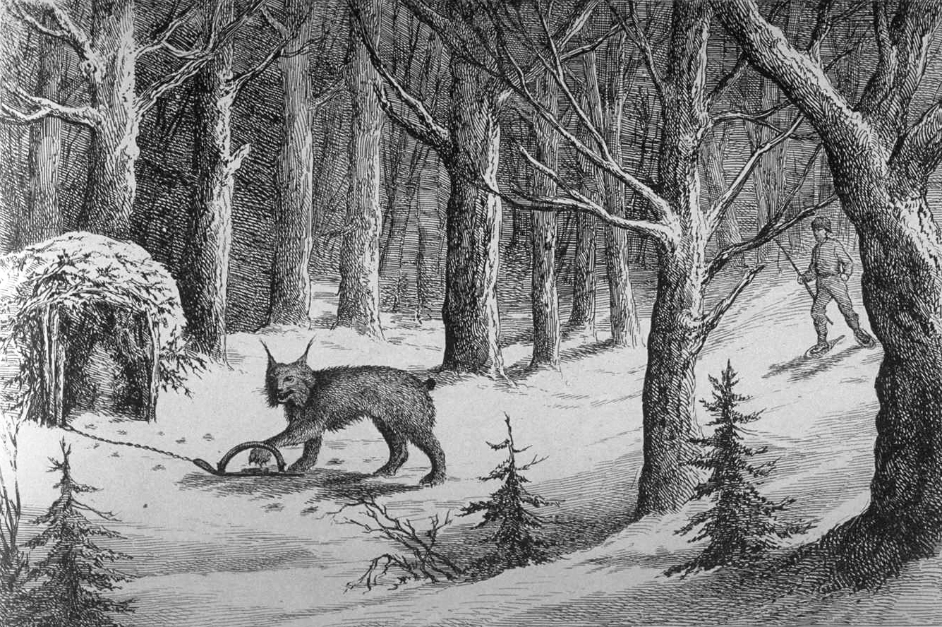 « Manière de prendre le loup-cervier au Labrador », gravure tirée de L'opinion publique, Vol. 2, no. 20, pp. 241 (18 mai 1871)